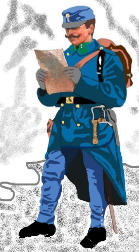 Jäger in Wintermarschadjustierung